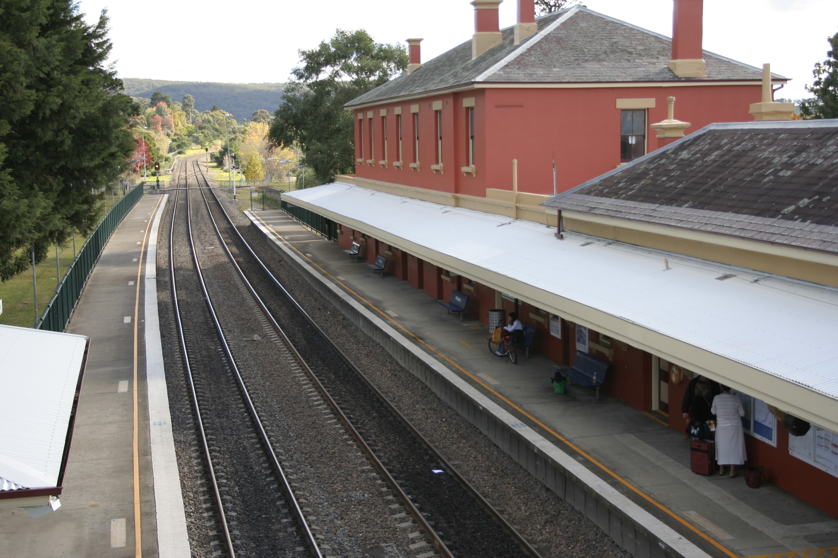 Mittagong station